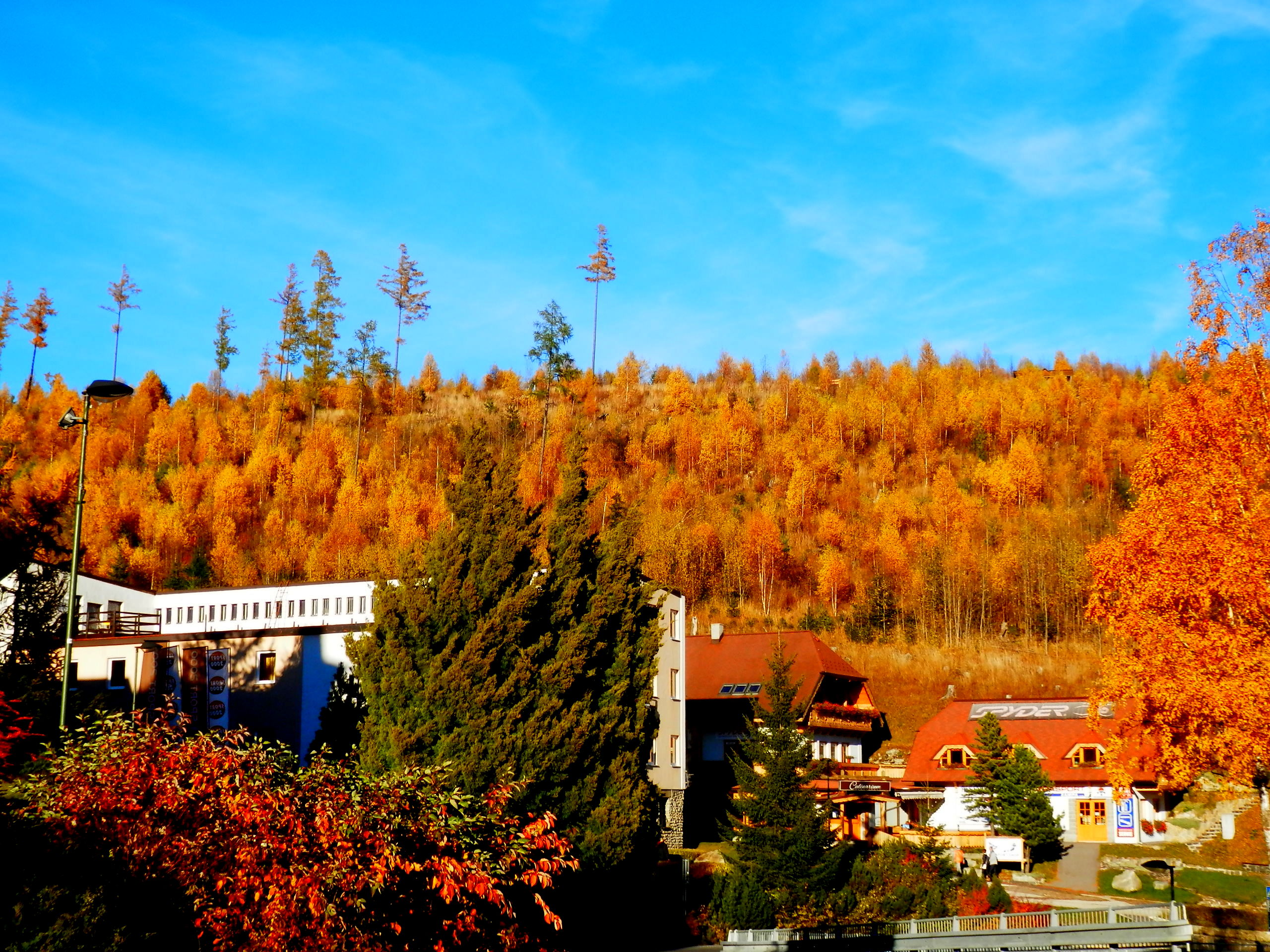 Krížová cesta na kalvárii v Starom Smokovci-Pekná vyhliadka, bola postavená v období rokov 2010 až 2015. Nejde o biblickú Kalváriu ale o moderný súbor umeleckých diel, umiestnených vo voľnej prírode. Mesto Vysoké Tatry. Okolitá príroda.Pohľad zo Starého Smokovca.